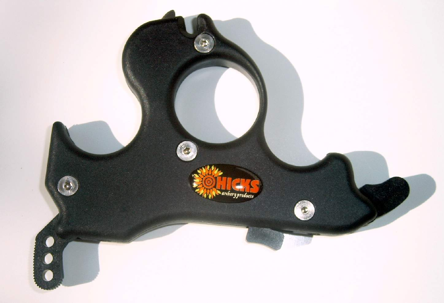 Release der Fa. "Hicks"